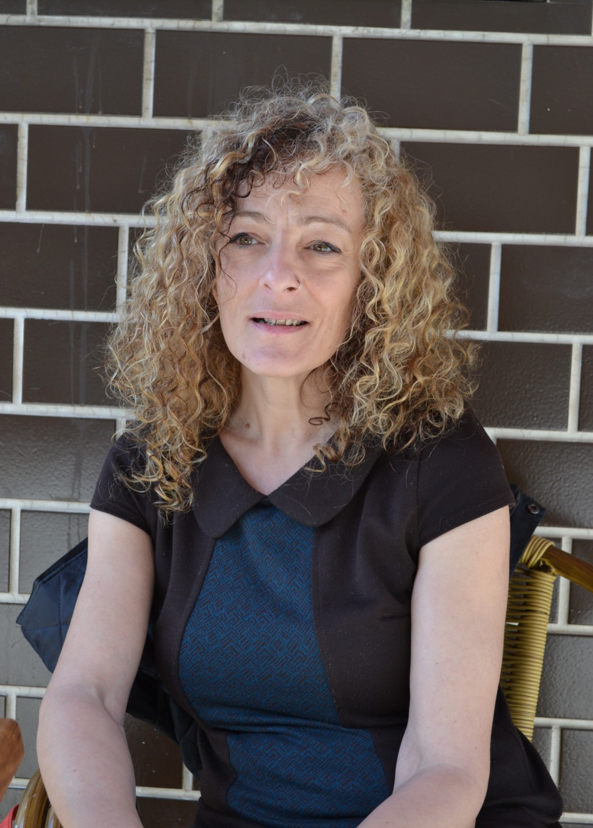 Teresa Moure nunha entrevista no 2014.